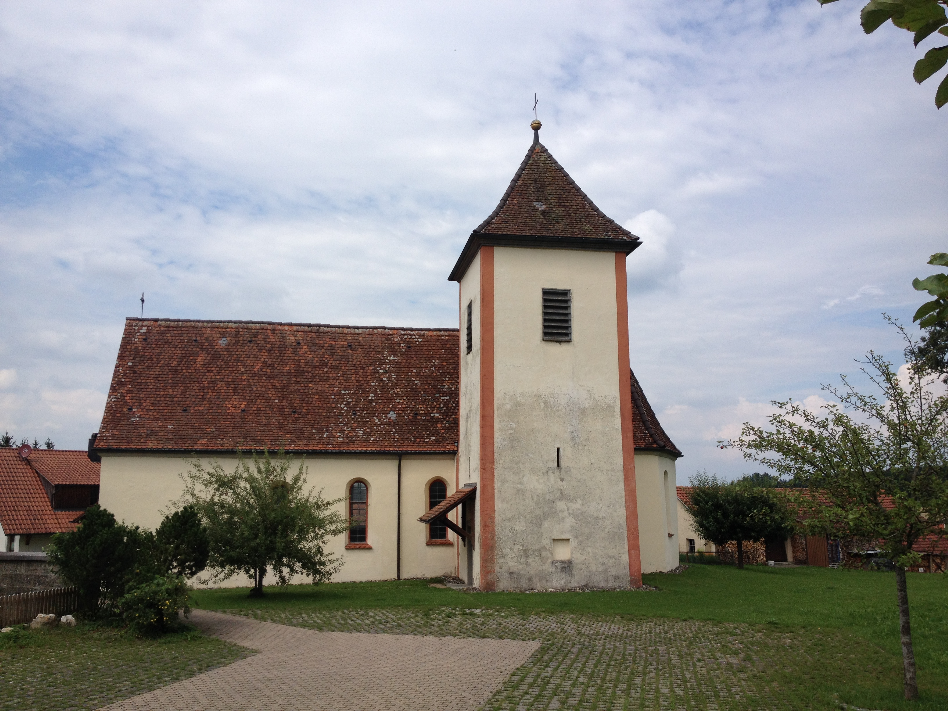 Pfarrkirche St. Nikolaus im Meßkircher Stadtteil Dietershofen